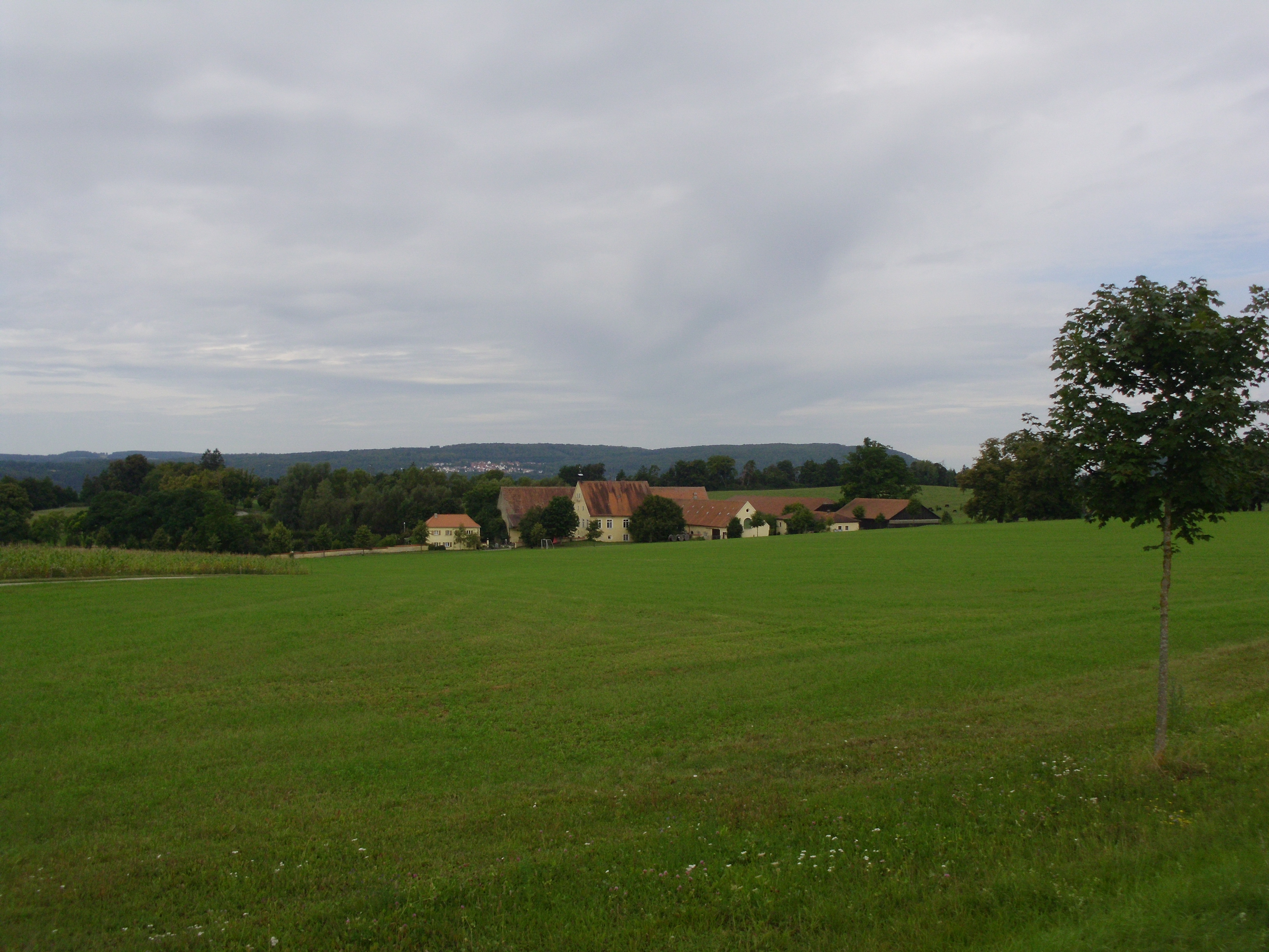 Bergnershof, Ortssteil von Treuchtlingen im mittelfränkischen Landkreis Weißenburg-Gunzenhausen